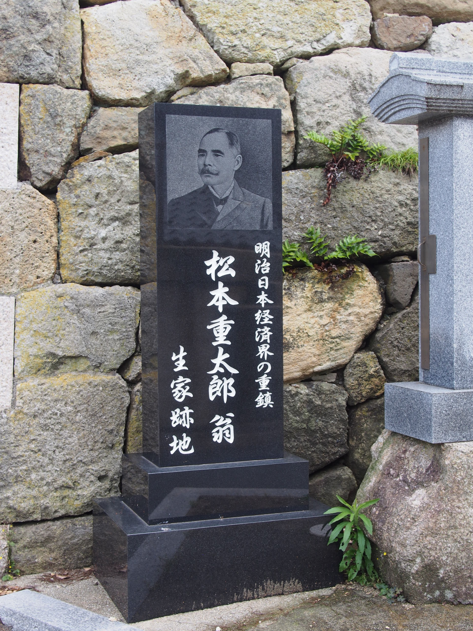 「松本重太郎翁生家跡地」碑 京都府京丹後市丹後町間人